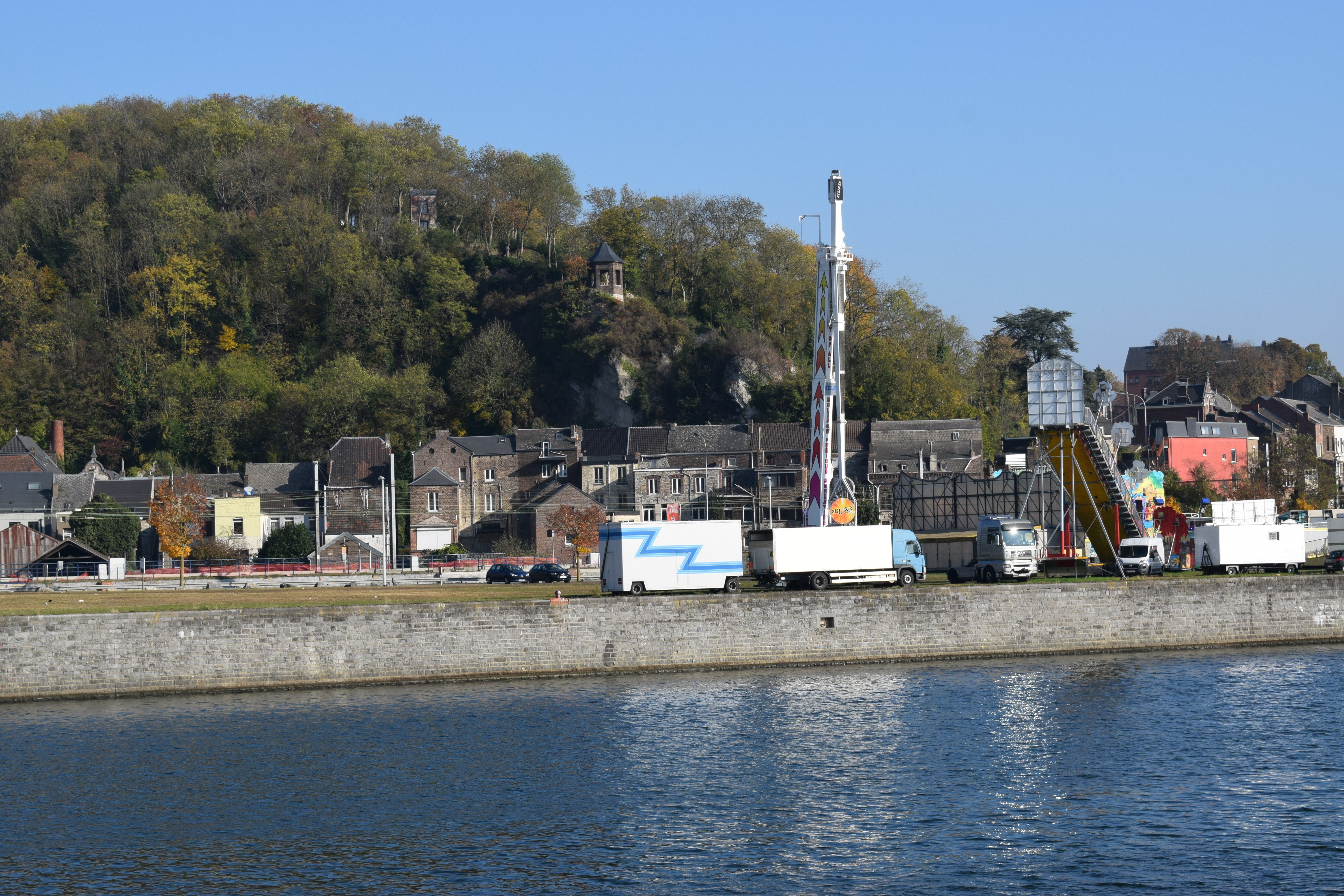 Vue de Huy, depuis la rive droite de la Meuse.